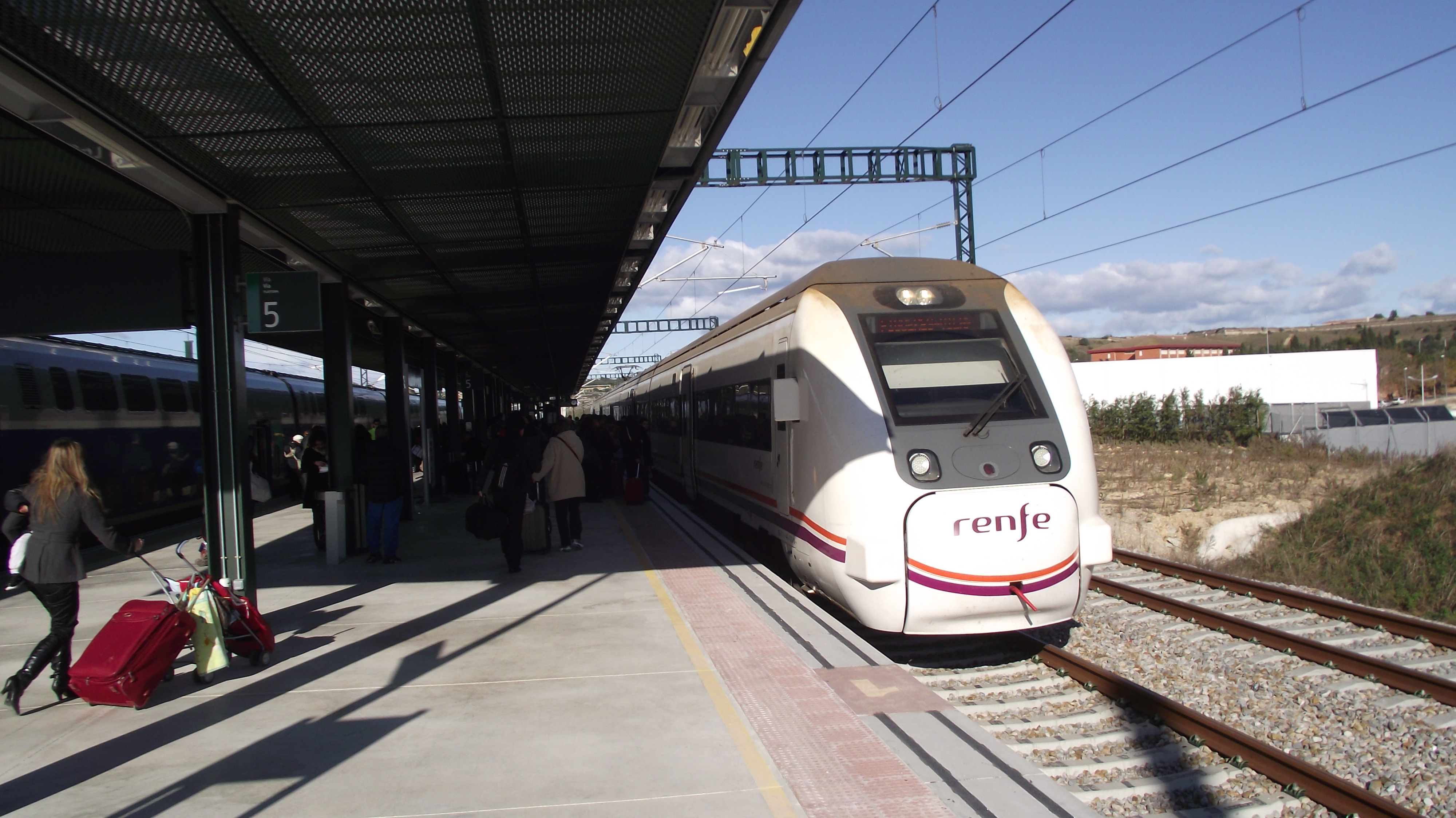 Overstap in Figueres Vilafante van een TGV naar een Spaanse trein